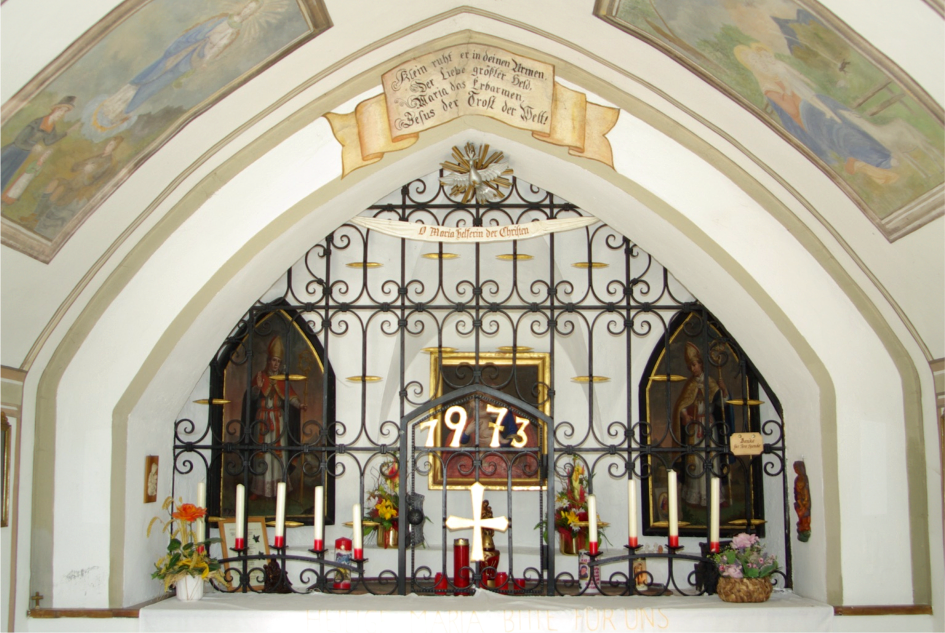 Waldkapelle